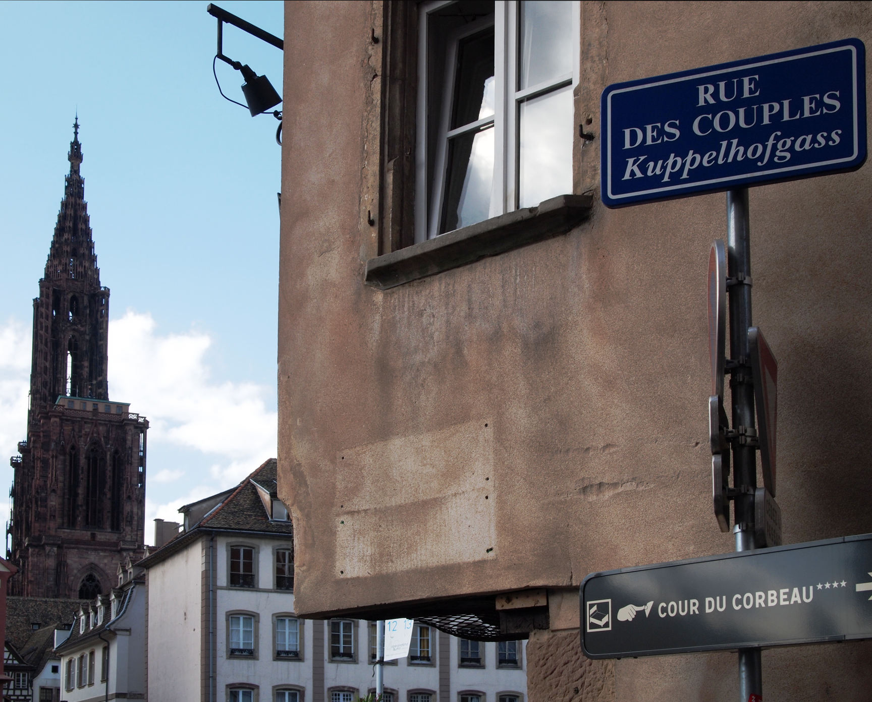 Kuppelhofgass in Straßburg